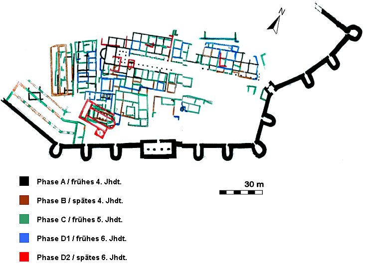 Grabungsplan Kastell Iatrus/Krivina (BG), Bauphasen 4. - 6. Jahrhundert.